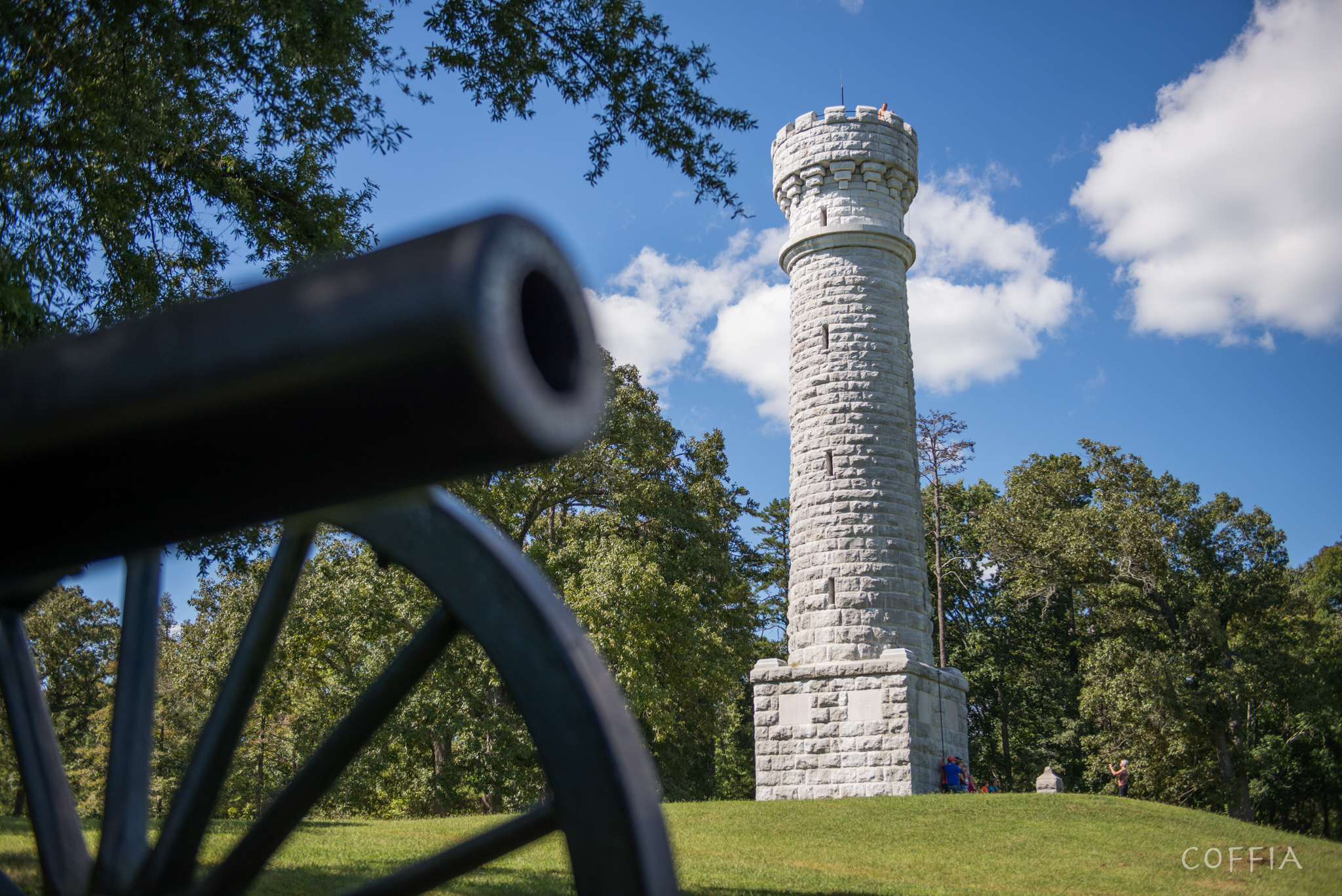 Chickamauga and Chattanooga National Military Park